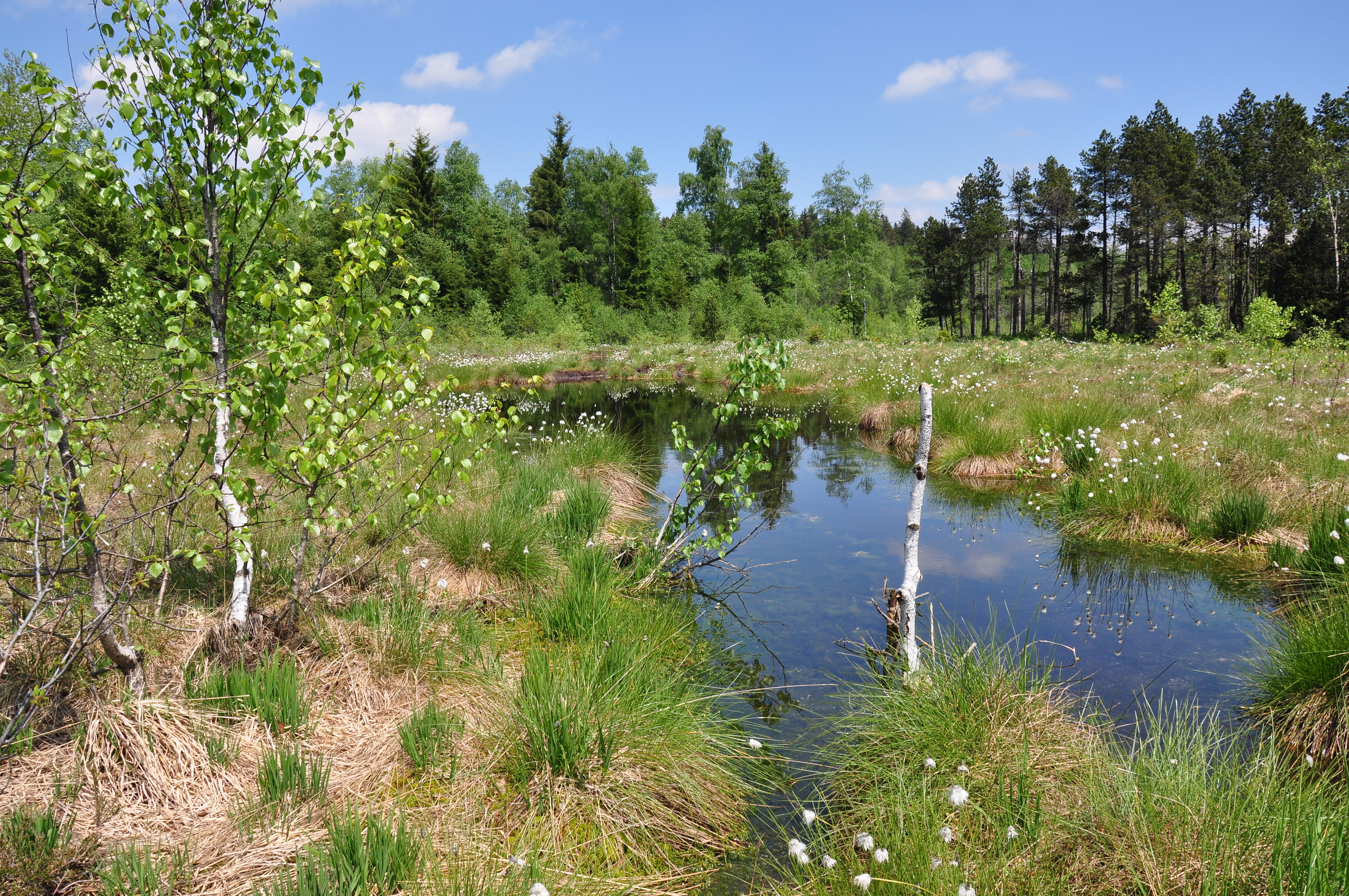 NSG-Breitenmoos bei Buchberg/Kempten.Freiflächen im Hochmoor mit Torfstichtümpeln und Birkenanflug, ideales Libellenhabitat.